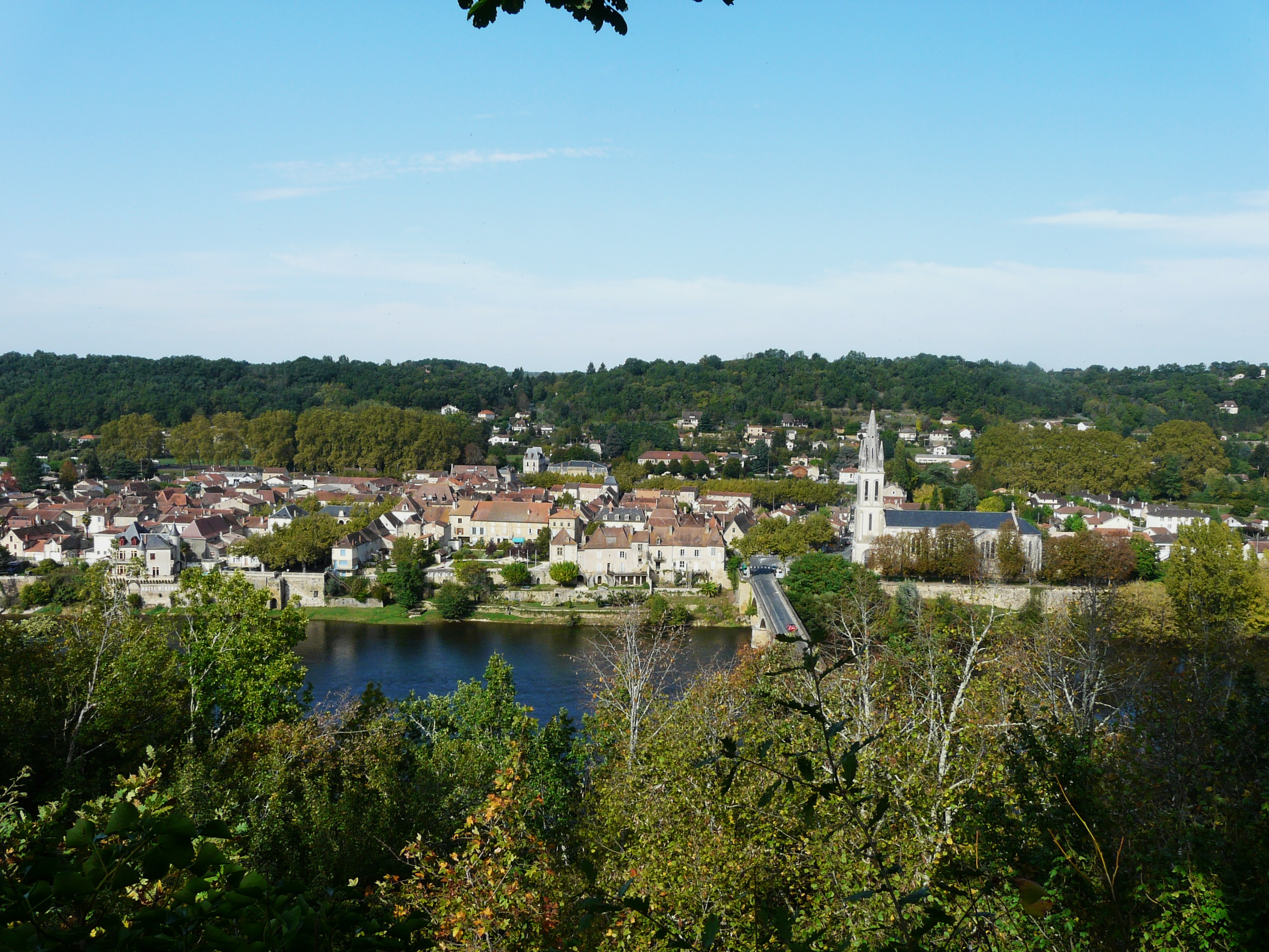 Vue générale de la ville de Lalinde, baignée par la Dordogne, département de la Dordogne, France. Vue prise depuis l'église Saint-Front de Colubri, à Couze-et-Saint-Front.